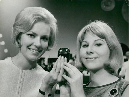 Foto taget i samband med tv-programmet "Tärningen är kastad". Bildtext i Svenska Dagbladet (1964-10-18): "Värdinnorna Birgitta Sandstedt, Sverige, och Vibeke Staal, Danmark, med tärningen."